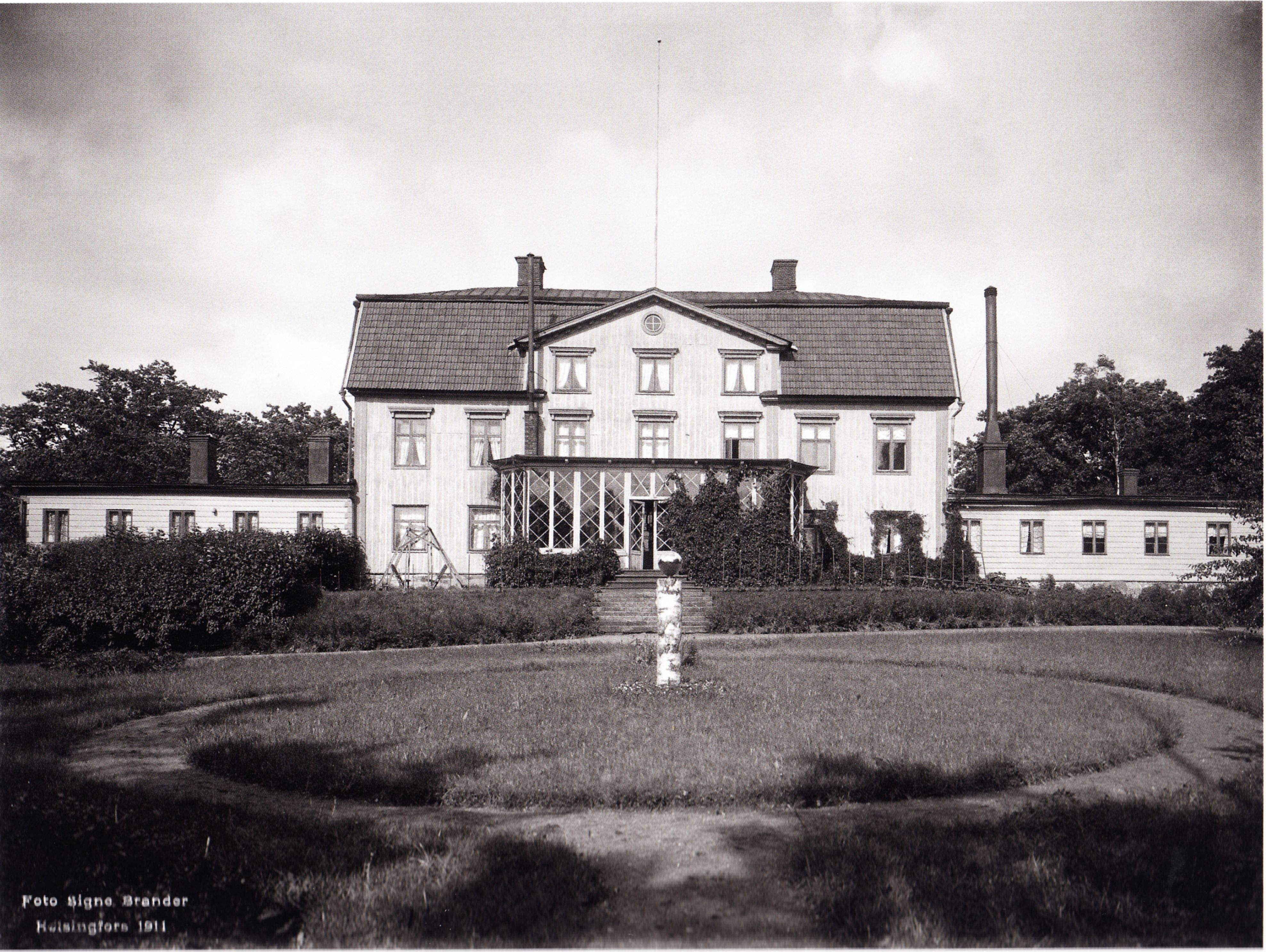 Björkbodan päärakennus vuodelta 1911